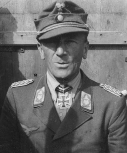 Scherl Eugen Meindl, Generalmajor der Fallschirmjägertruppen 4830-42